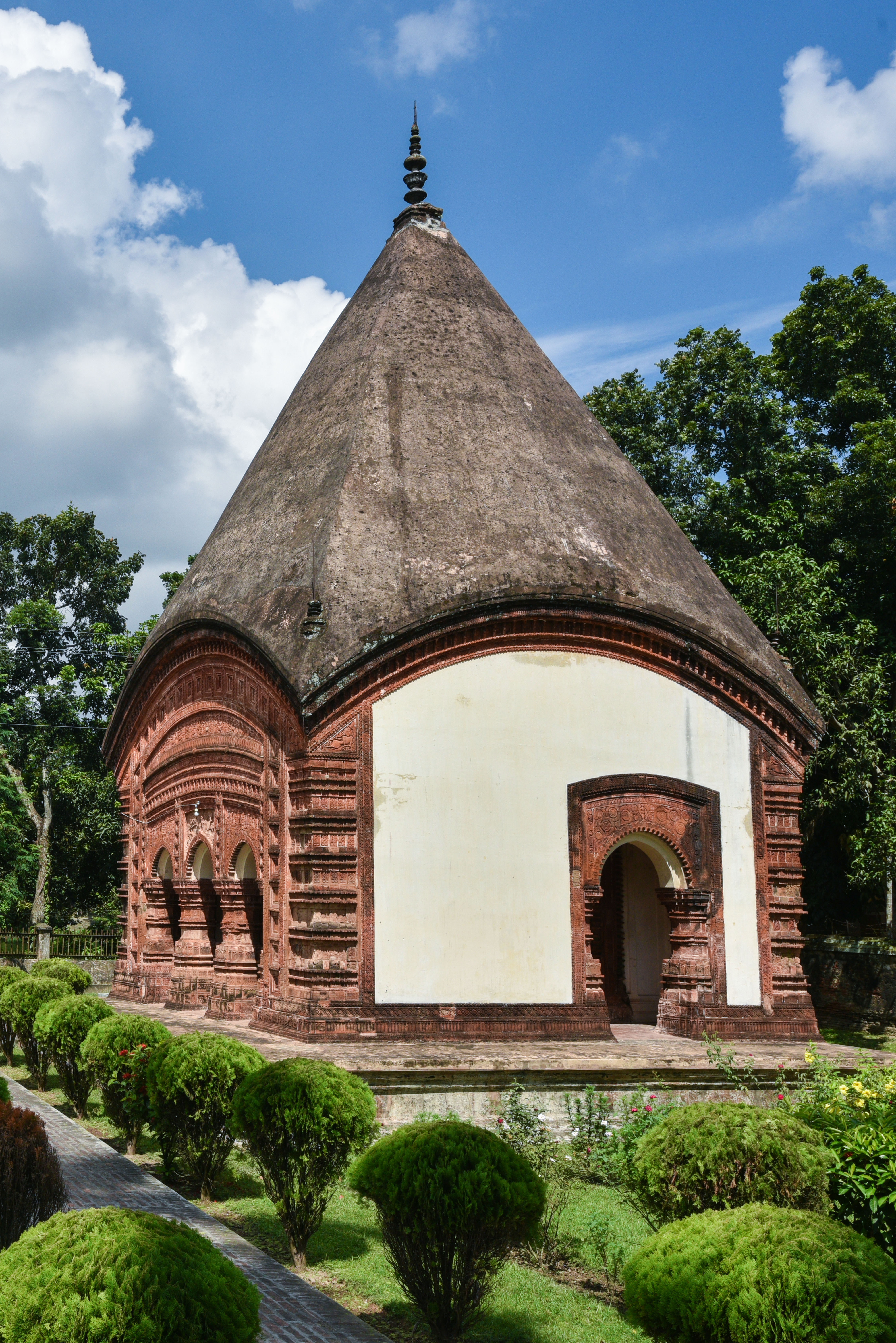 ছোট গোবিন্দ মন্দির, পুঠিয়া